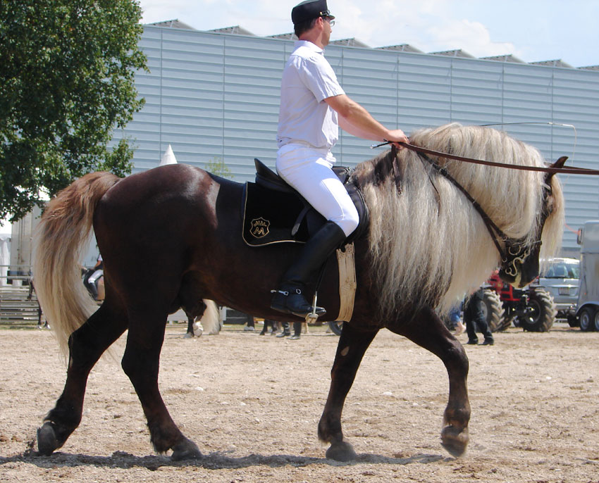 Schwarzwälder Kaltbluthengst aus dem Haupt- und Landgestüt Marbach, vorgestellt auf der Eurocheval in Offenburg.